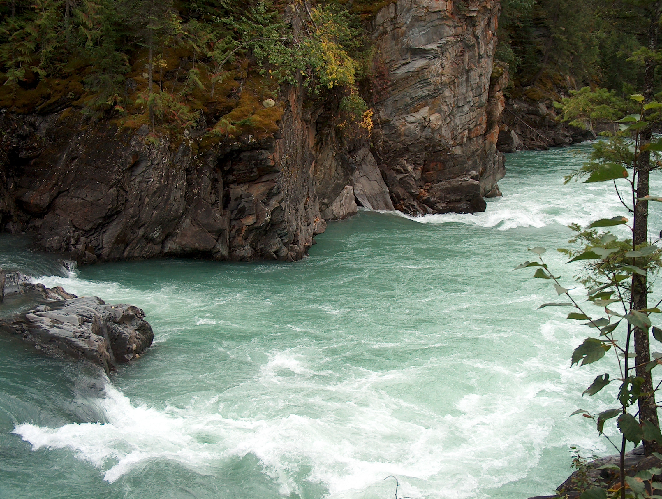 Rapids on the Fraser River below Overlander Falls.